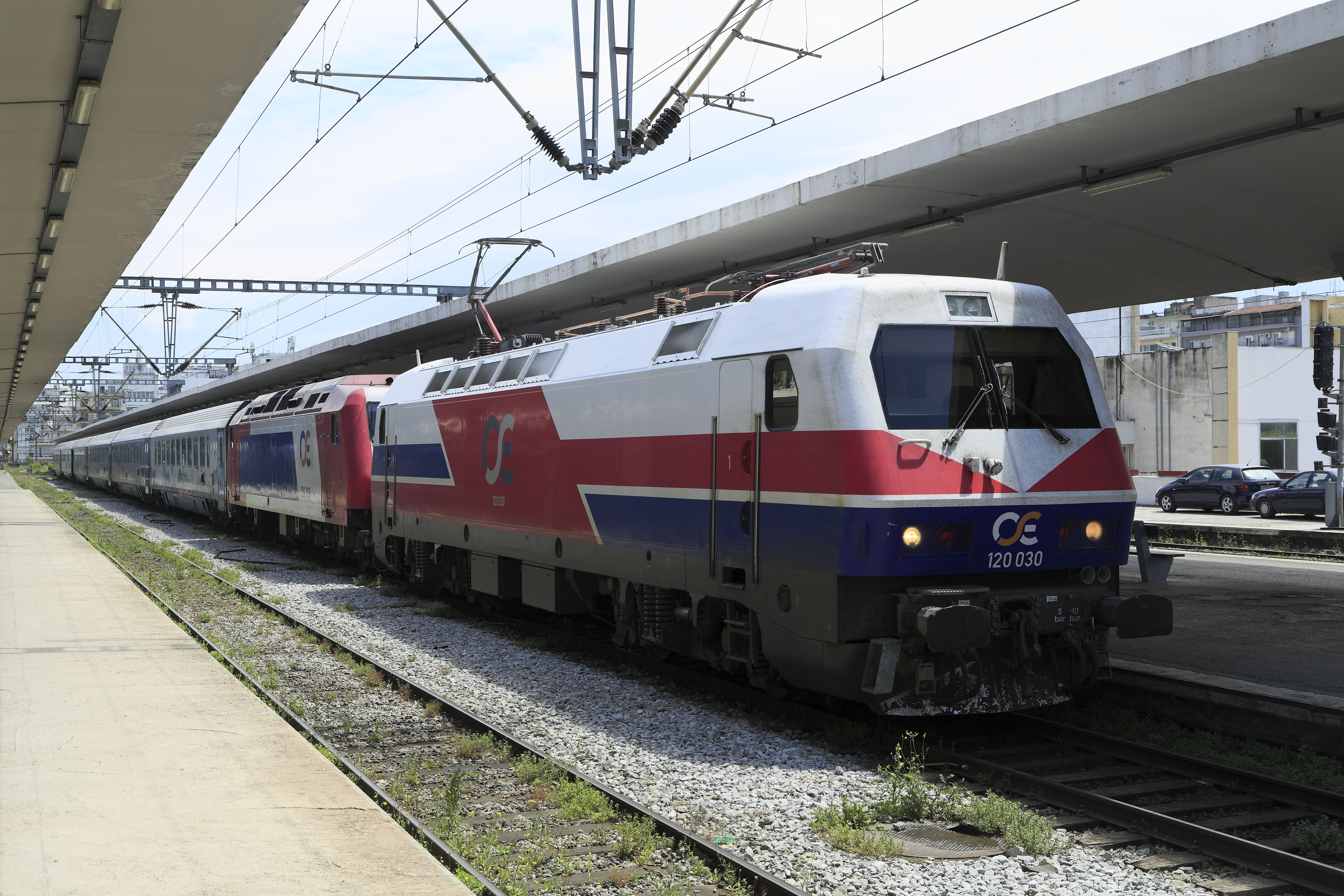 Schnellzug Thessaloníki–Athína. Hinter der Ellok läuft eine Diesellok der Reihe 220, abgeleitet von den DB-101. Möglicherweise ist die Strecke bis Athen doch noch nicht durchgehend elektrisch befahrbar.